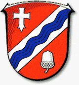 Coat of arms Hellwege, Wappen der Gemeinde Hellwege